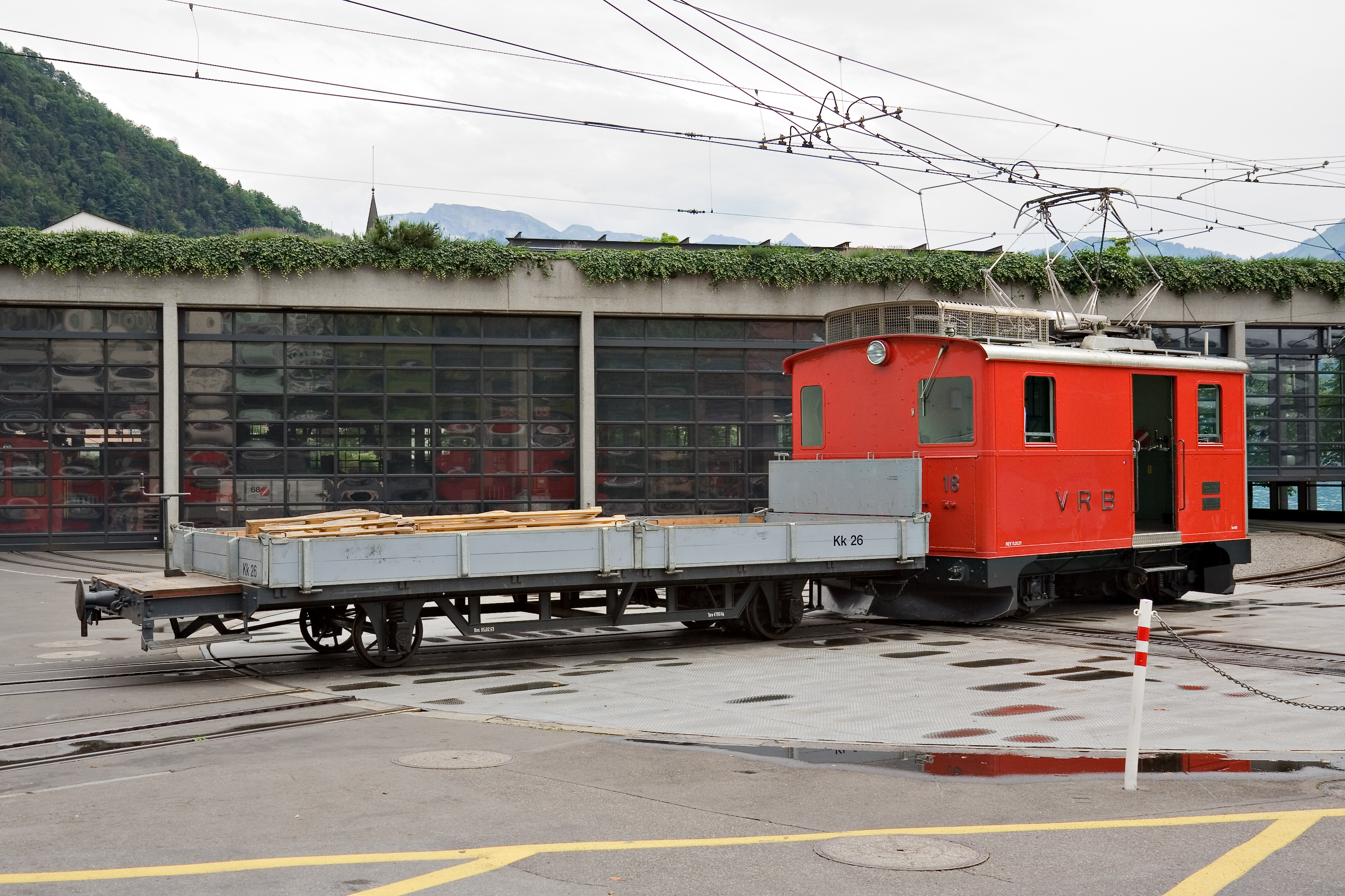 Die Lokomotive Nr. 18 der Vitznau-Rigi-Bahn auf der Drehscheibe der Talstation. Speziell ist der Radius des Gleises auf der Drehscheibe.